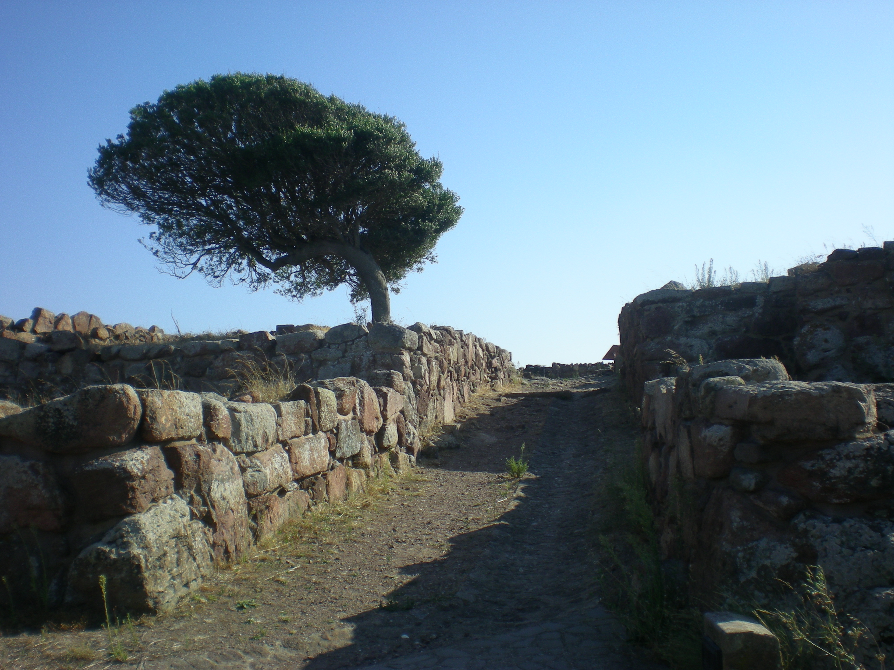 Area archeologica di Monte Sirai - MIBAC This is a photo of a monument which is part of cultural heritage of Italy.